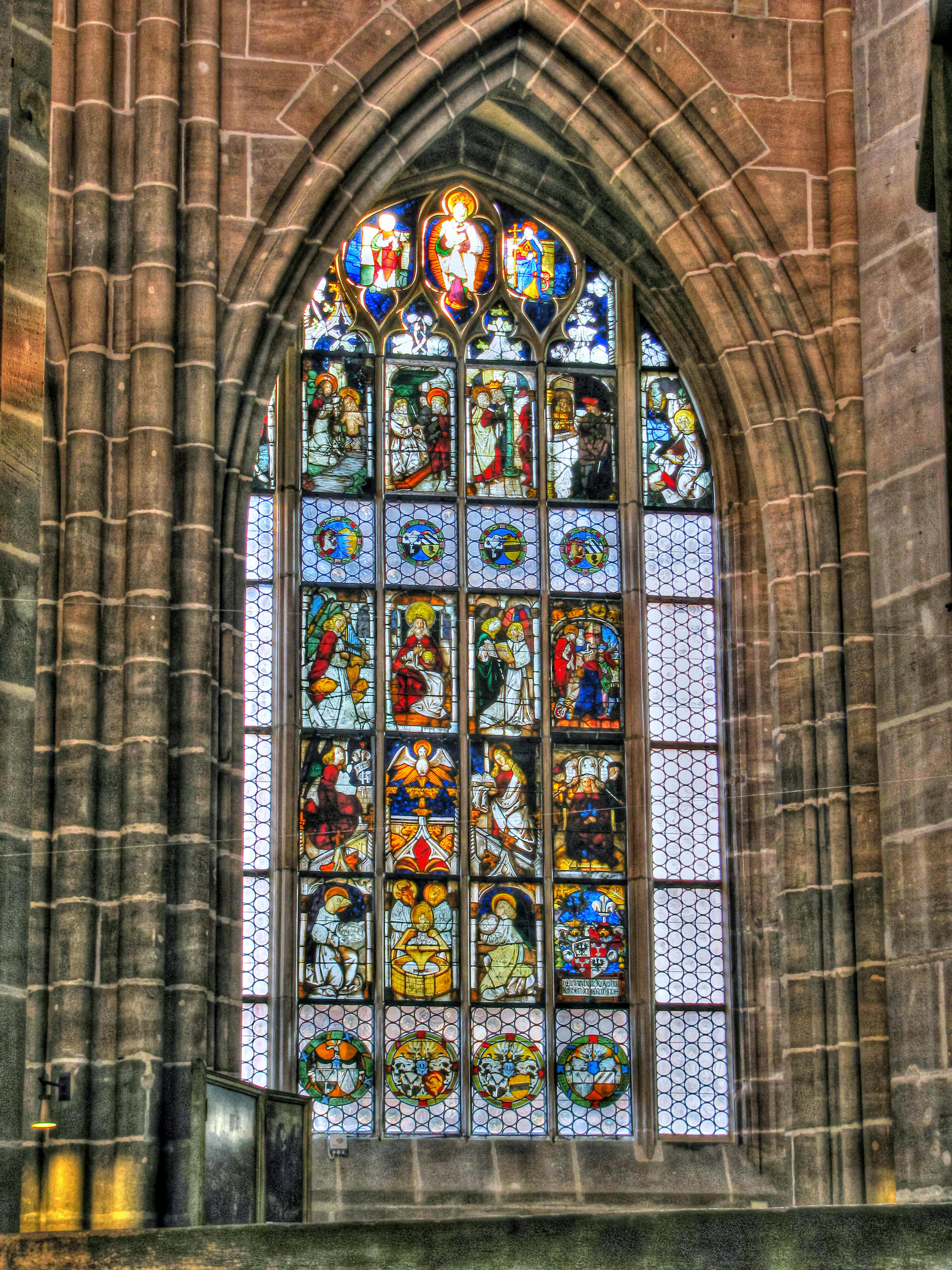 Siehe Link-1